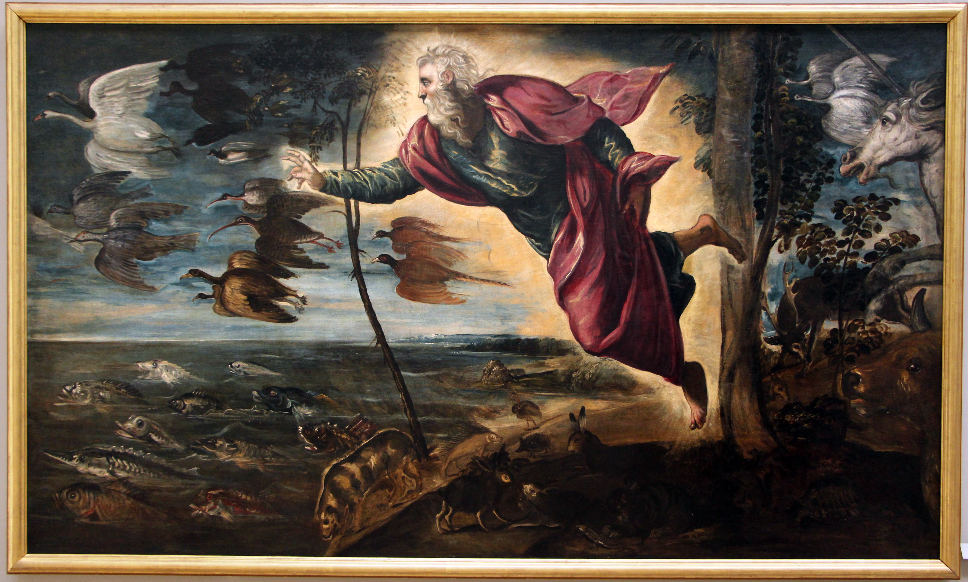 Gallerie dell'Accademia - MIBAC The making of this document was supported by Wikimedia CH. (Submit your project!) For all the files concerned, please see the category Supported by Wikimedia CH. This is a photo of a monument which is part of cultural heritage of Italy.